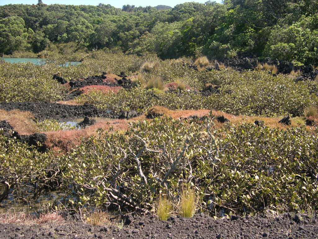 Landschaft auf Rangitoto Island